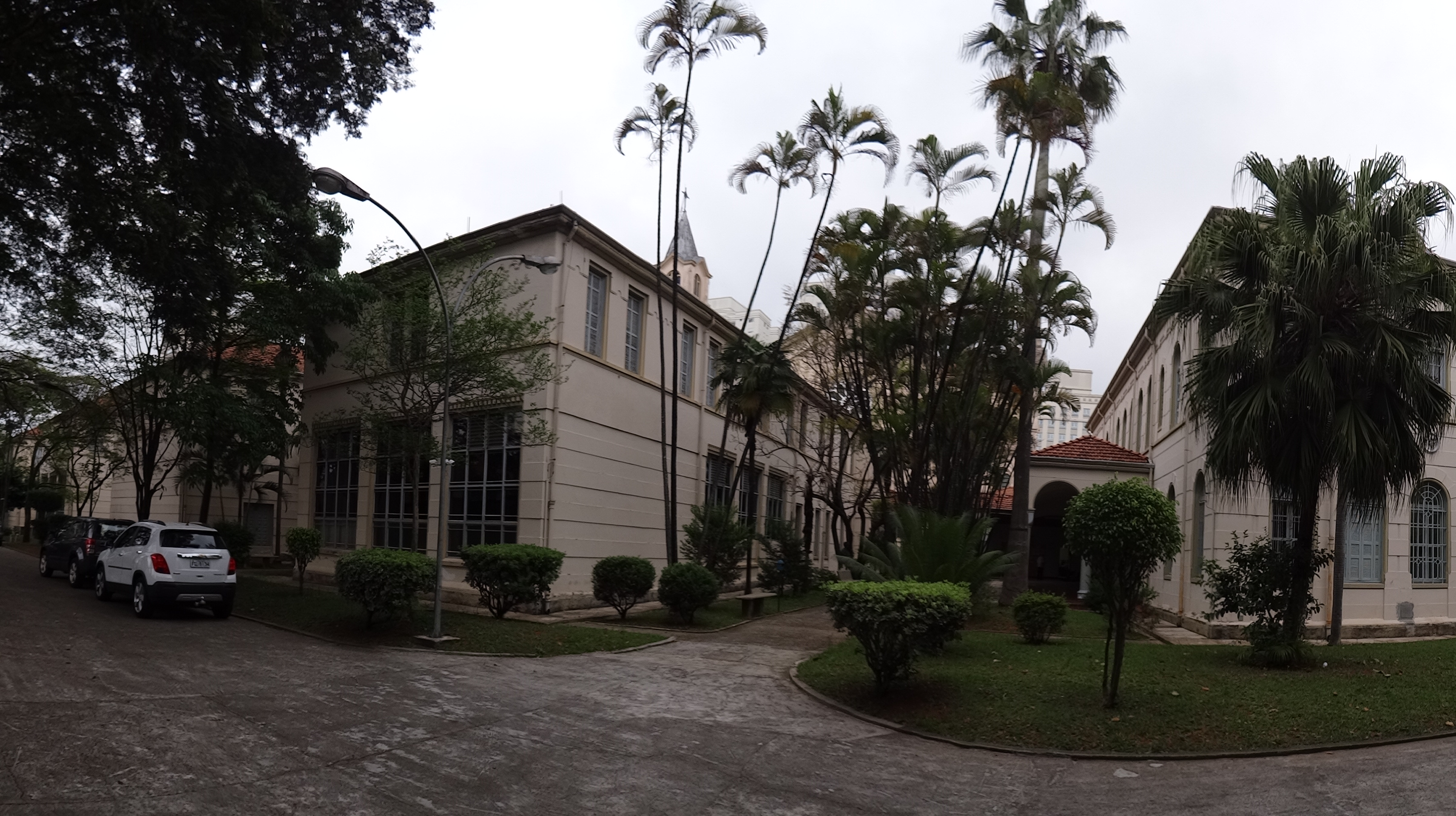 Panorâmica do jardim externo do lado esquerdo do Seminário Central do Ipiranga, São Paulo (SP), Brasil.